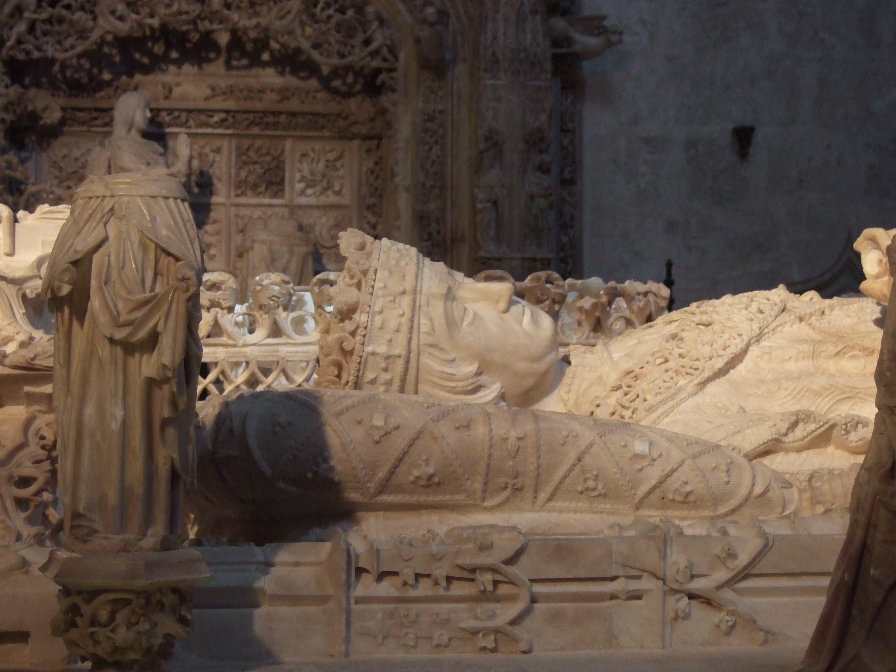 Tumba de Juan II de Castilla (siglo XV); retrato del soberano